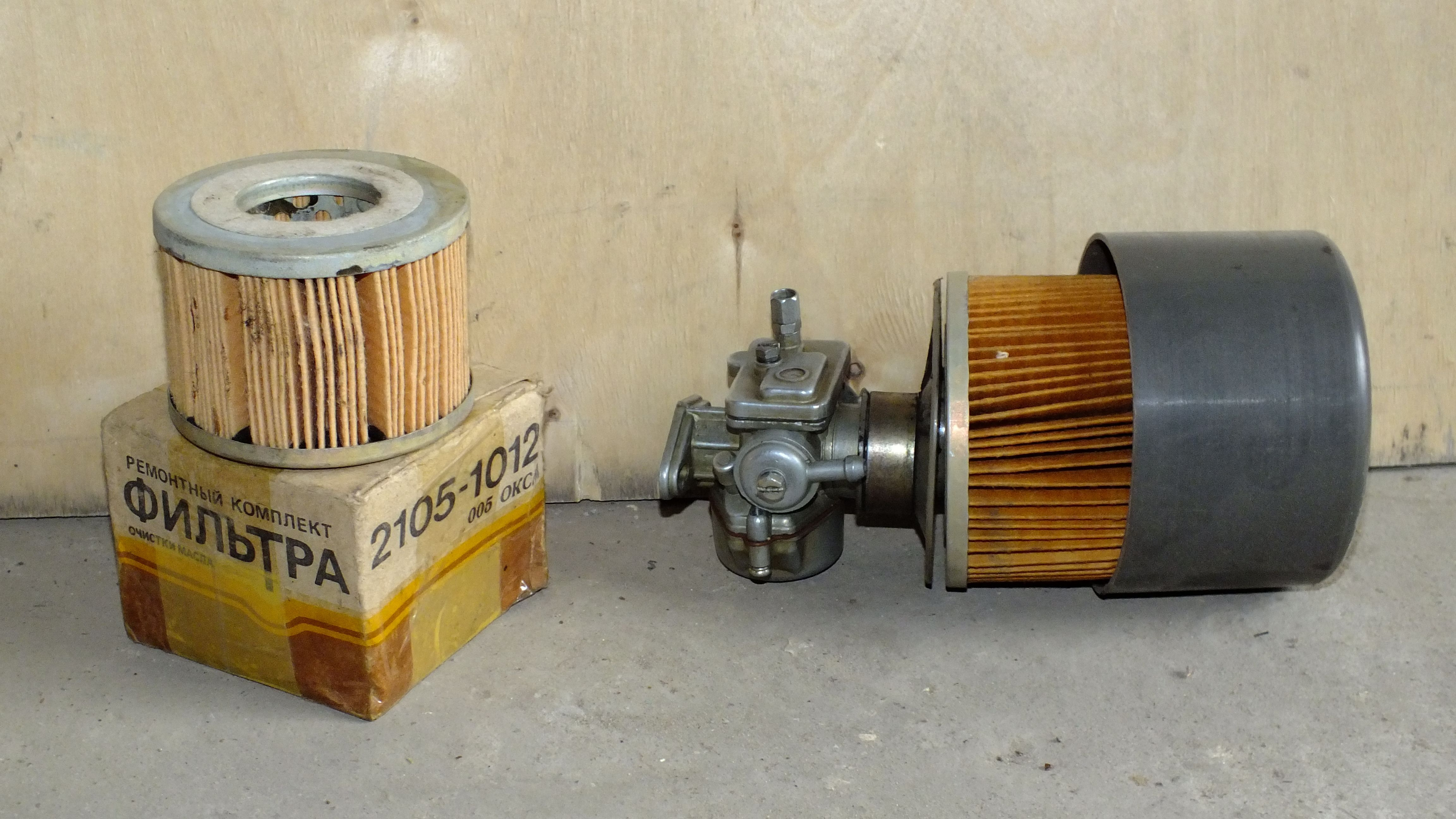 Сменный элемент масляного фильтра как воздушный фильтр и карбюратор К-60В